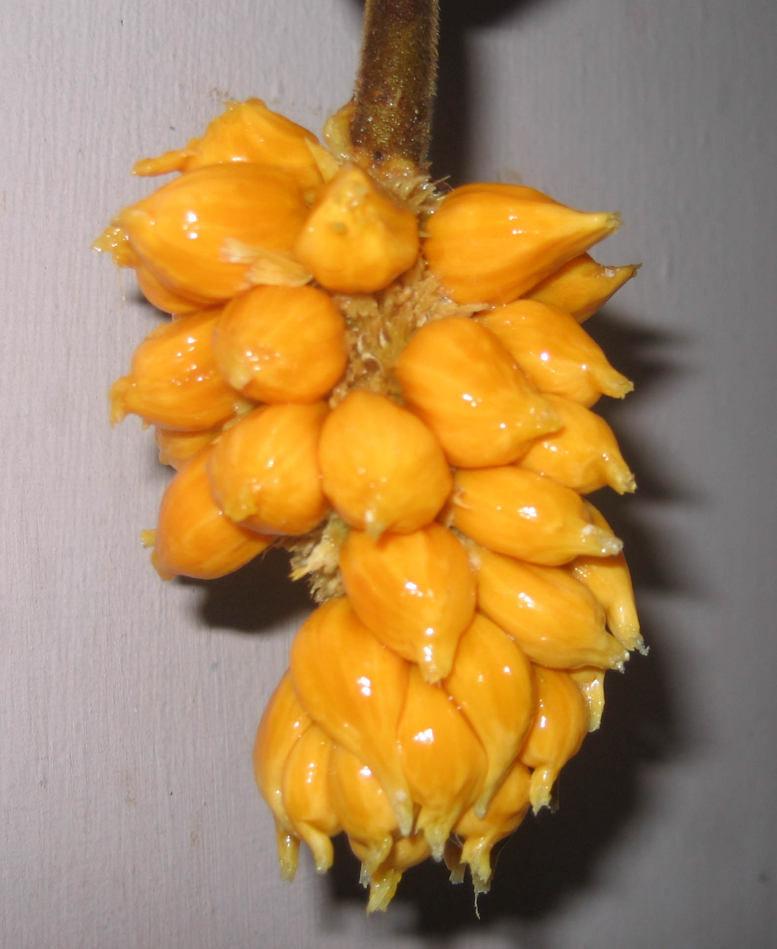 ആഞ്ഞിലിപ്പഴം, ആഞ്ഞിലിച്ചക്ക, അയണിച്ചക്ക, അയിനിചക്ക, ഐനിച്ചക്ക, ആനിക്കാവിള, ആനിക്കാ, എന്നീ പേരുകളിൽ അറിയപ്പെടുന്ന ആഞ്ഞിലിയുടെ (Artocarpus Hirsutus) ഫലം.